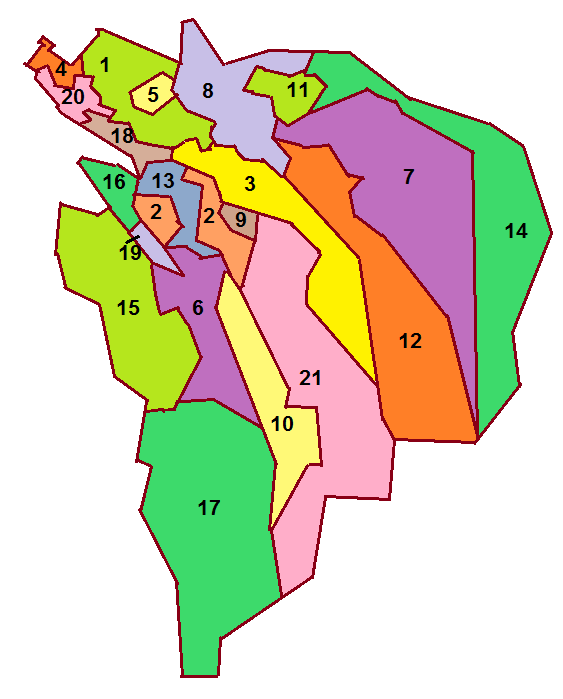 Сельсоветы Володарского района Астраханской области